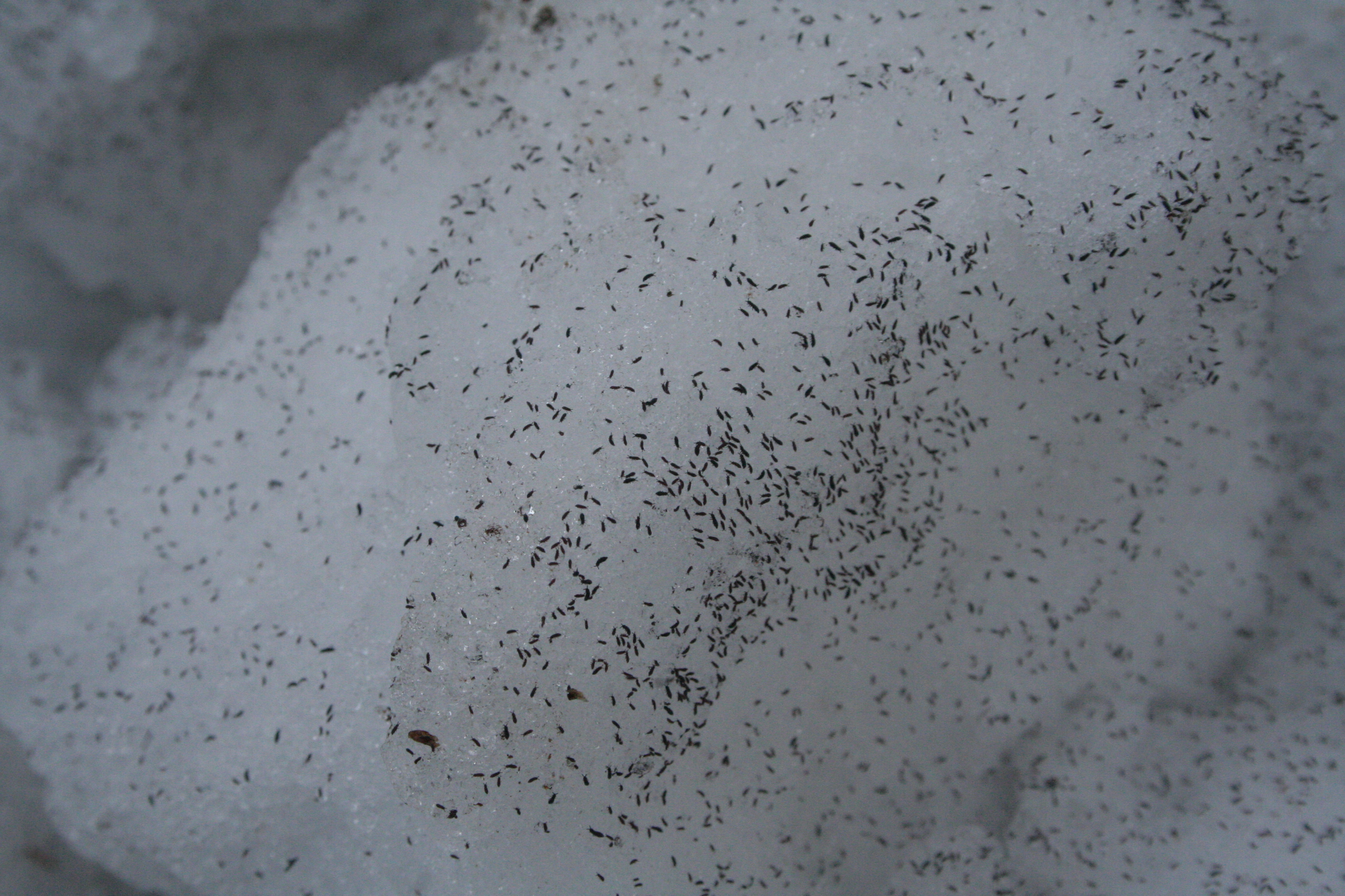 Schneefloh Population (Desoria nivalis (Carl, 1910) (syn. Isotoma nivalis)) in einem Wald bei München